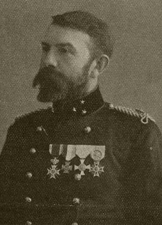 Theodorus Marinus Roest van Limburg (1865-1935); Hoofdcommissaris van politie te Rotterdam en later Amsterdam / Chief Constable of the Rotterdam and later Amsterdam Police